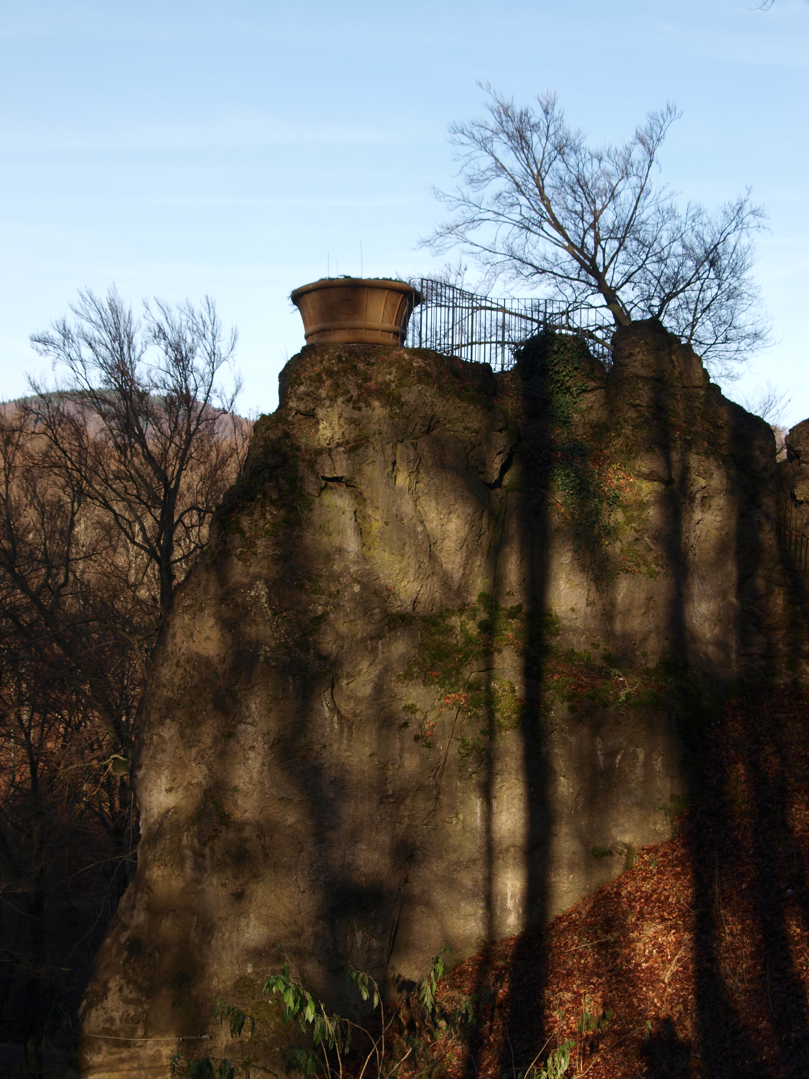 Der neue Blumenkorb im Altensteiner Park